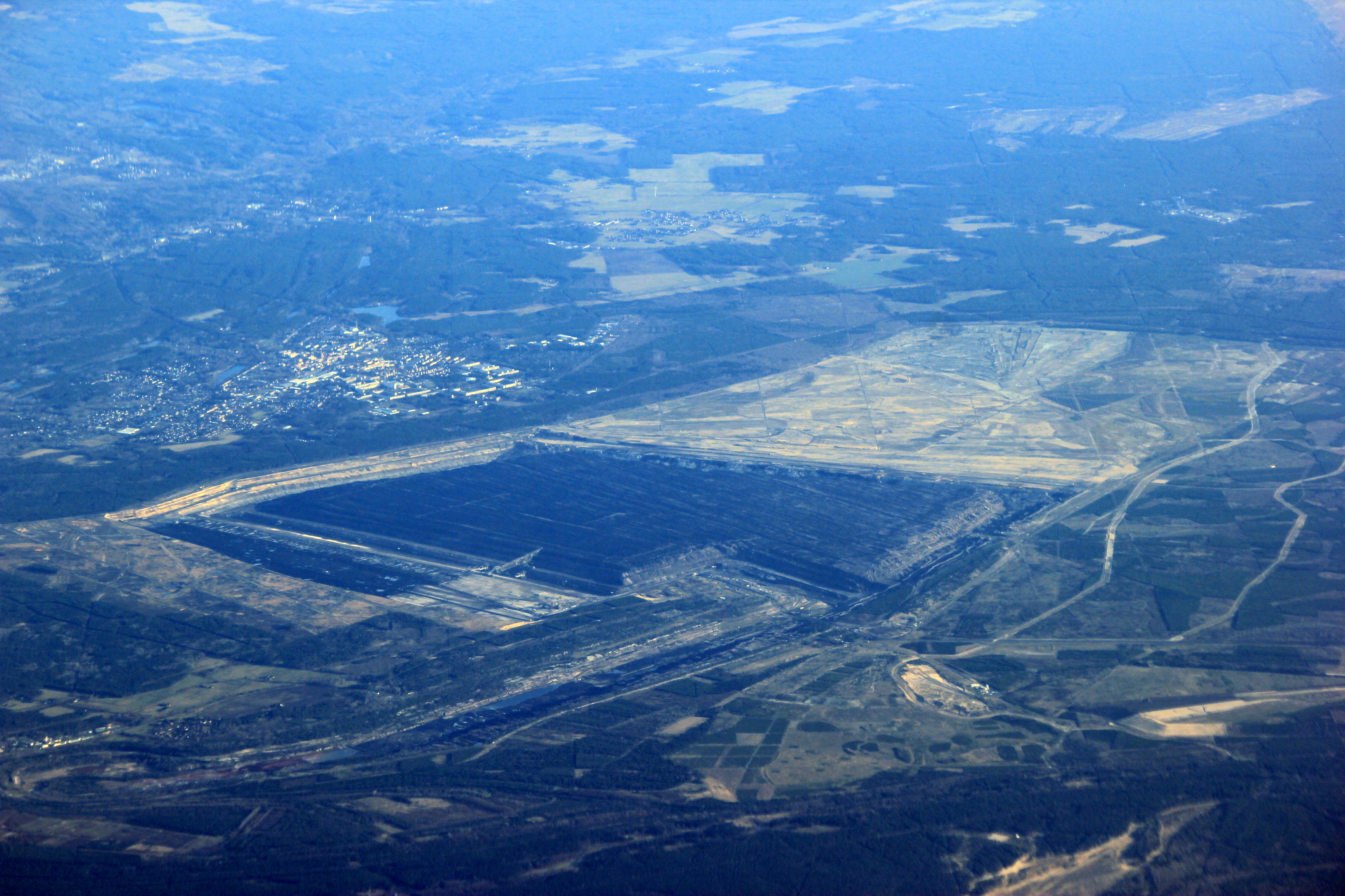 Hornjoserbsce: Wochožanska jama a město Běła Woda.